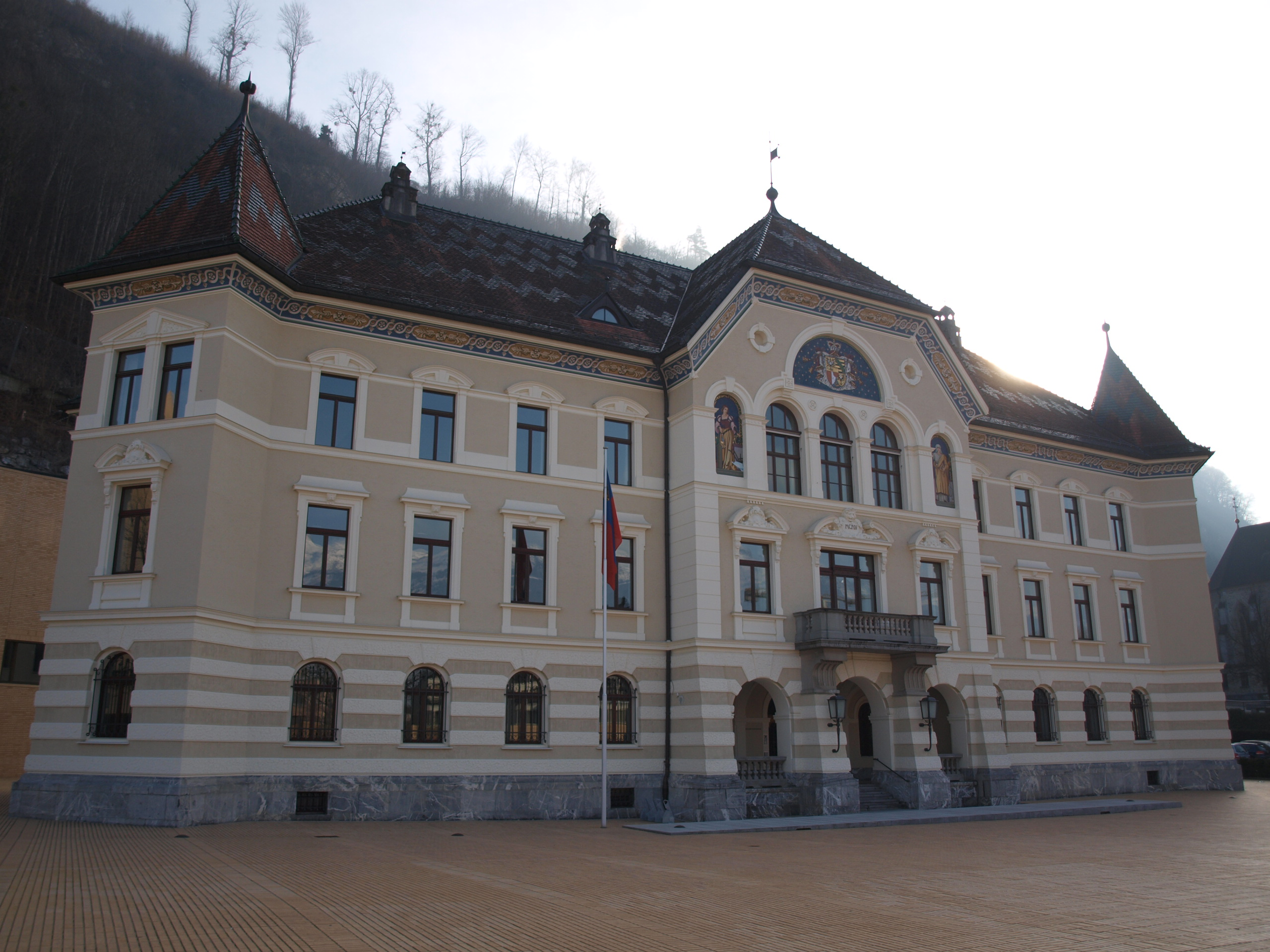 Regierungsgebäude Fürstentum Liechtenstein in Vaduz (Südseite)